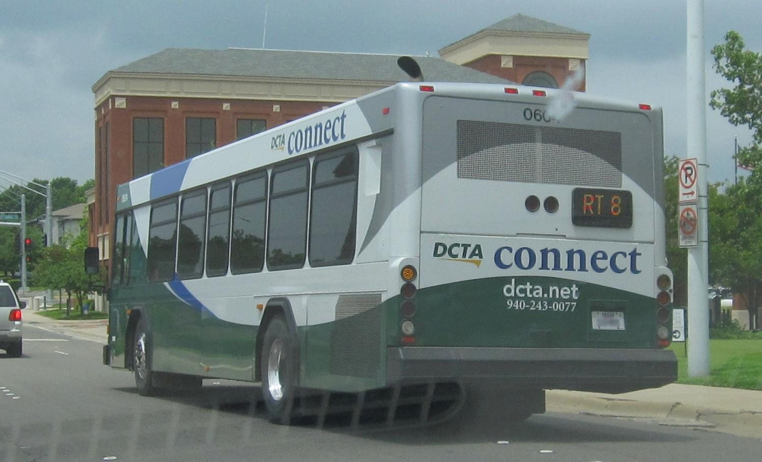 Denton DCTA bus